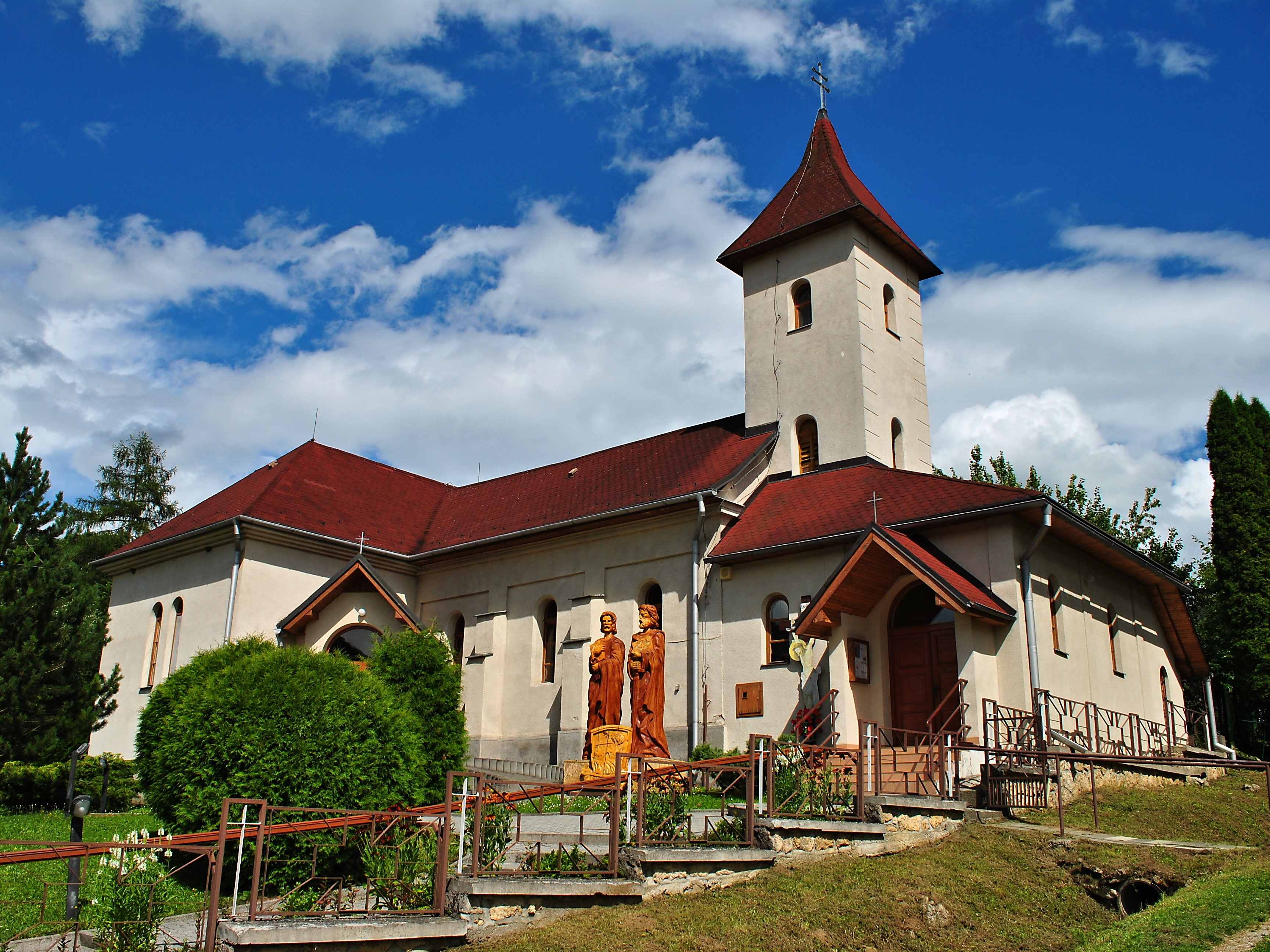 Kalameny, okres Ružomberok - katolícky kostol